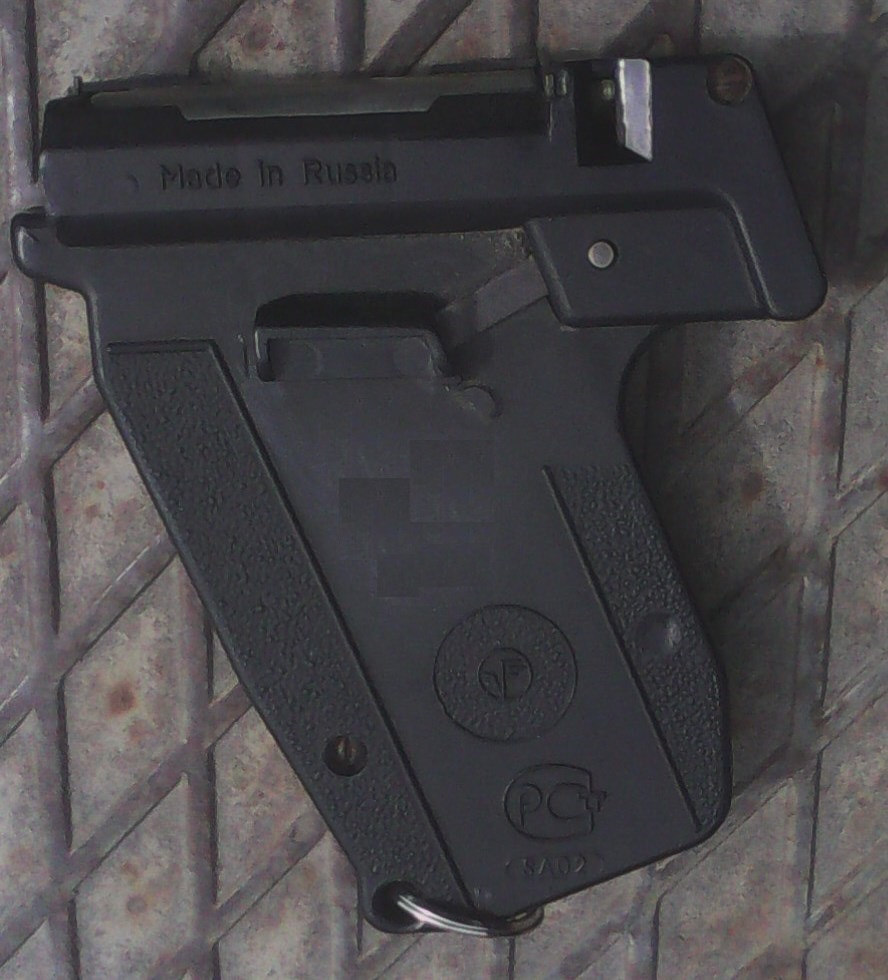 УДАР (устройство дозированного распыления аэрозоля), снаряжённый, поставлен на предохранитель.